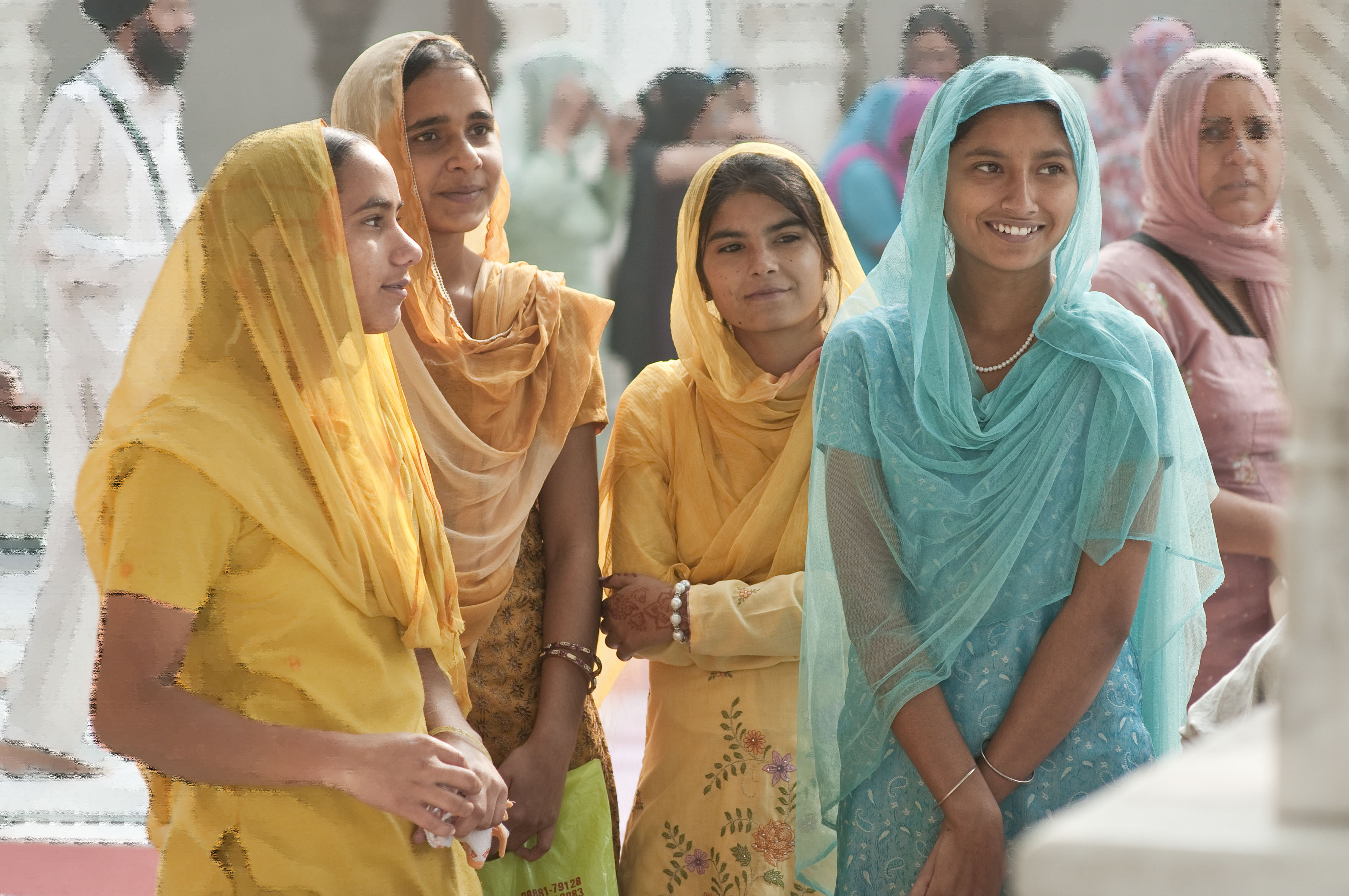 Amritsar